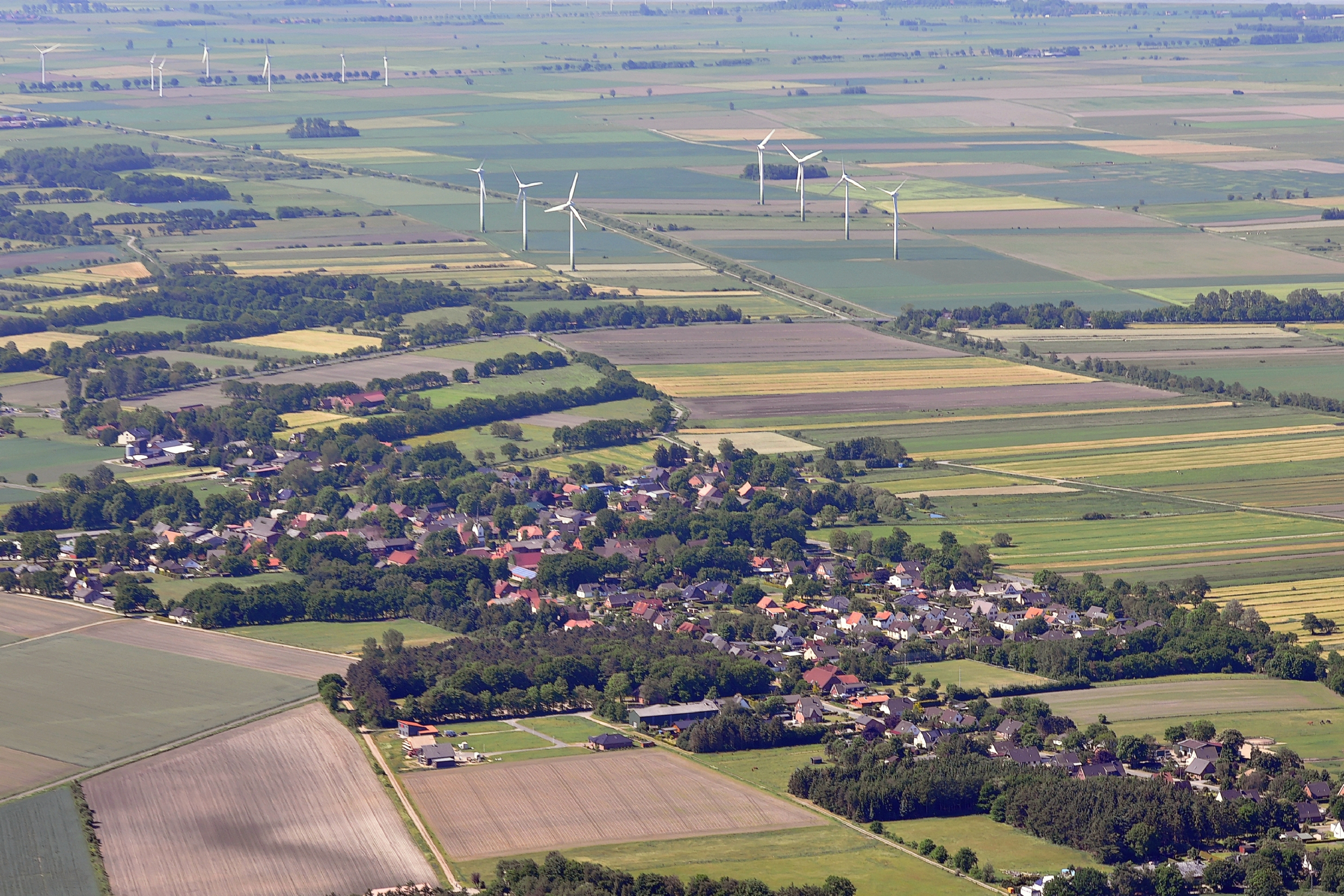 Luftbilder von der Nordseeküste 2012-05